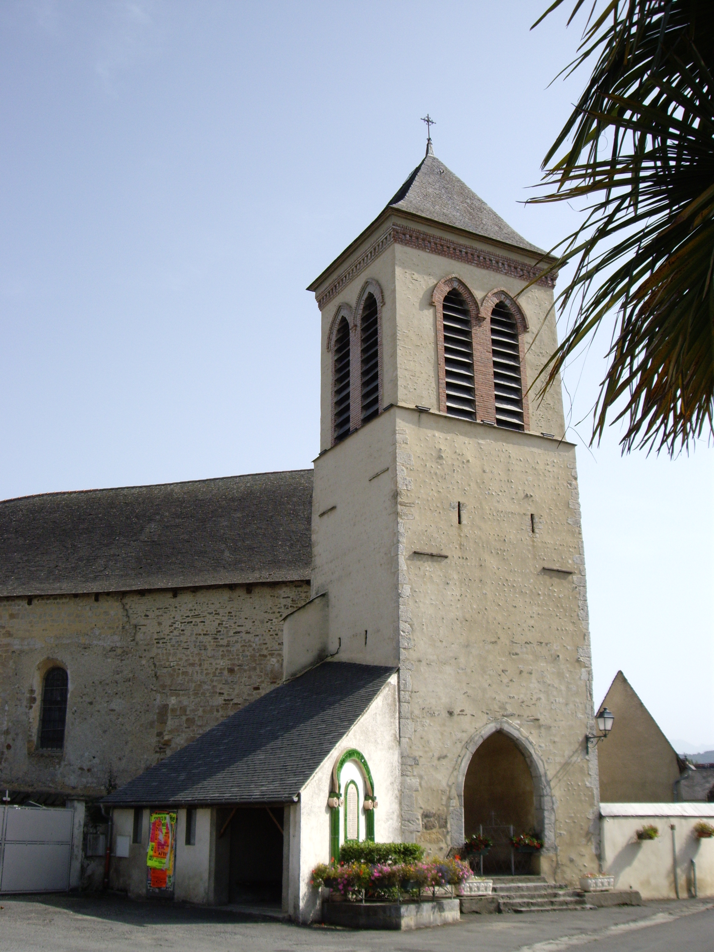 Église de la Nativité-de-la-Sainte-Vierge de Benac (65)